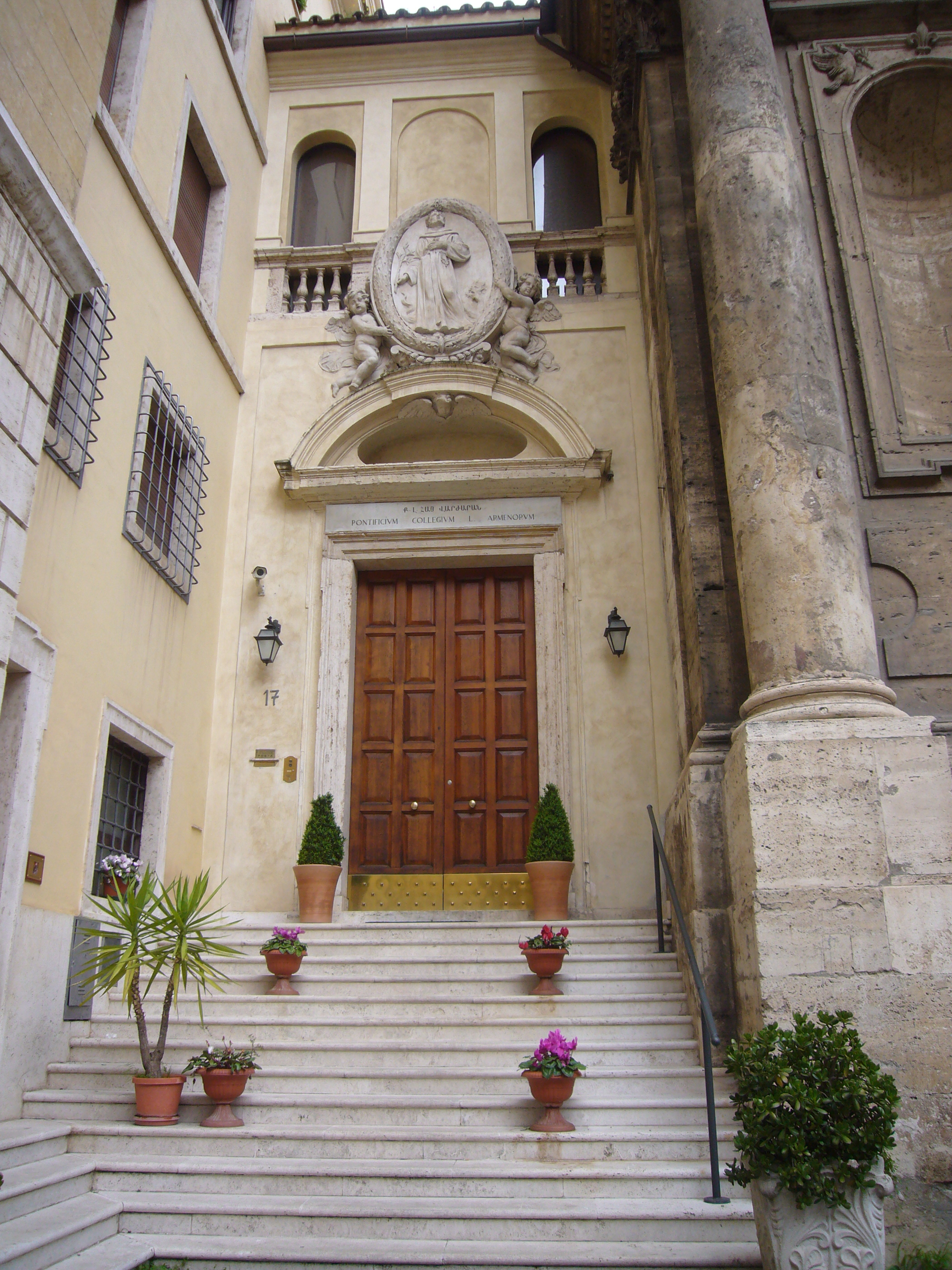 Roma, salita san Nicola da Tolentino - pontificio Collegio armeno nel convento della chiesa